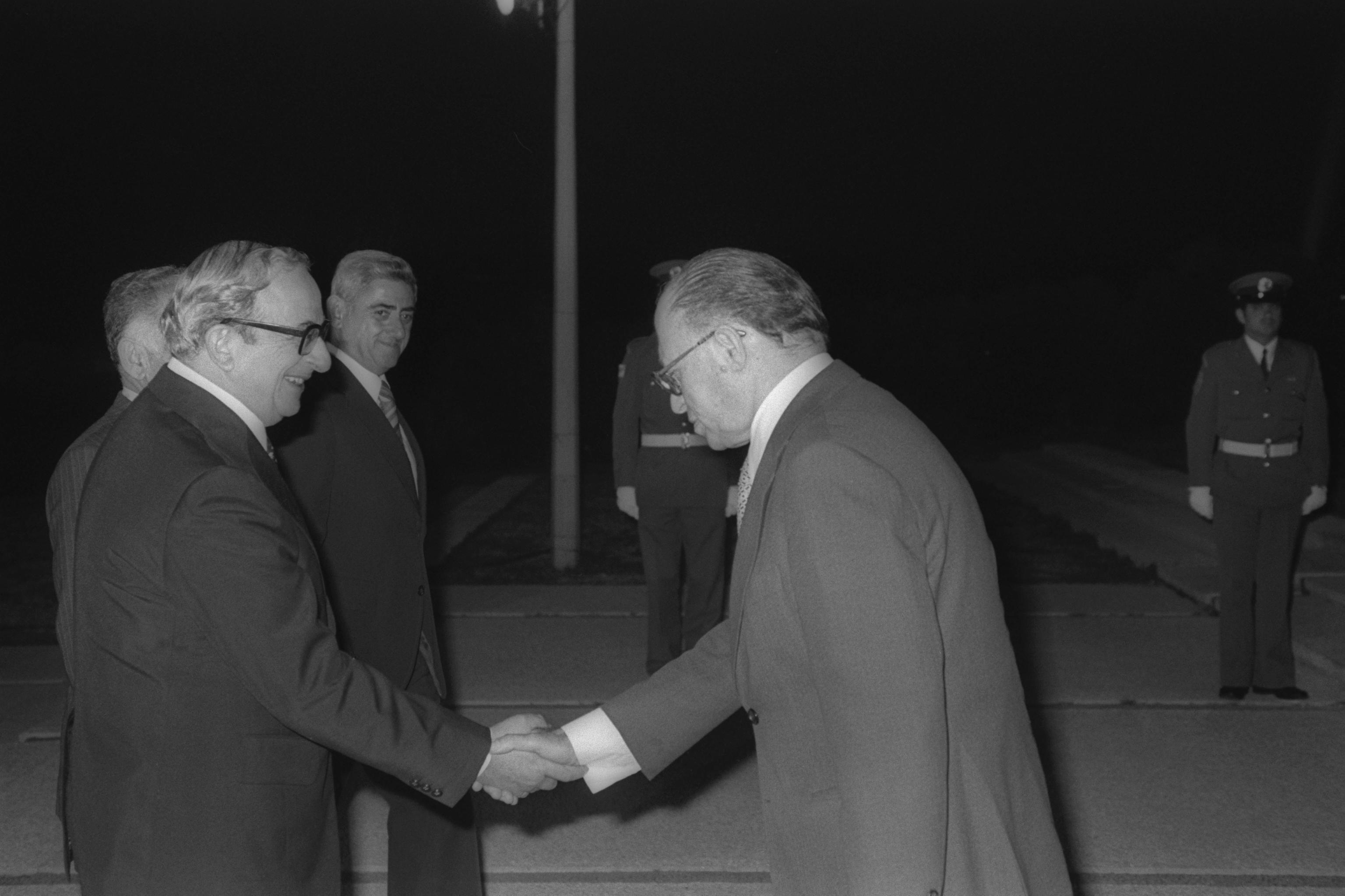 P.M. Menahem Begin shaking hands with President Yitzhak Navon after his return from the siginig of the Israeli-Egypt peace treaty. נשיא המדינה יצחק נבון מקבל את פני ראש הממשלה מנחם בגין, לאחר חזרתו מטקס החתימה על הסכם השלום עם מצרים.